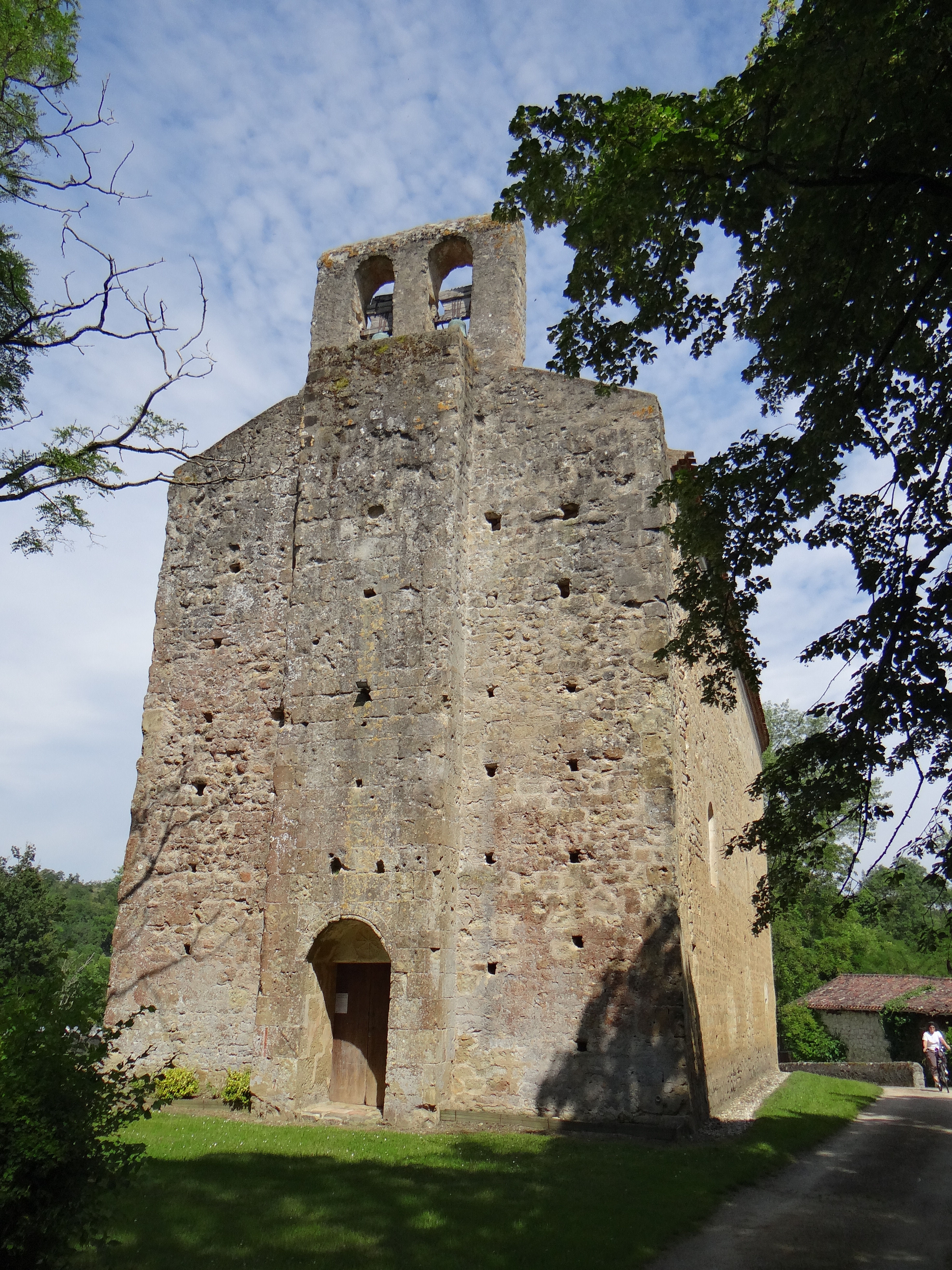 Lamaguère - Église Saint-Michel - Façade occidentale